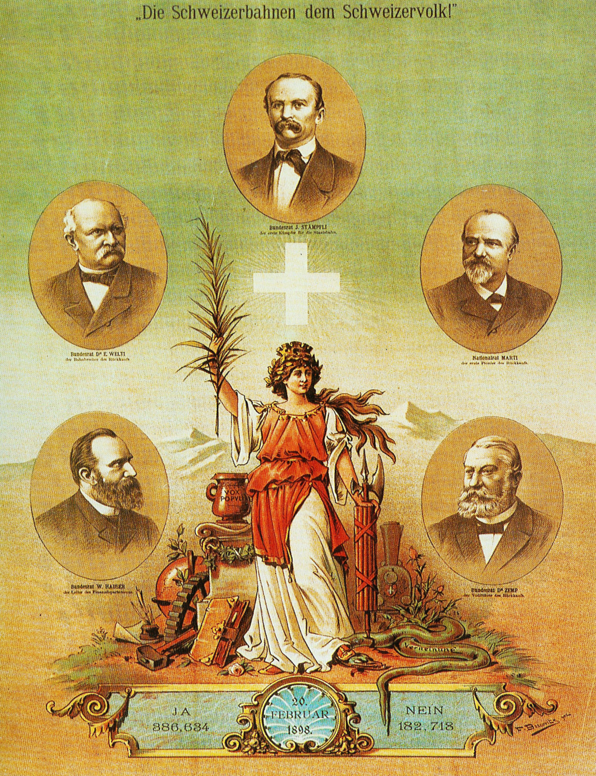 Gründung der SBB: Fritz Boscovits, Die Schweizerbahnen dem Schweizer Volk, 1898 1898 stimmte eine Mehrheit für die Verstaatlichung der grossen Privatbahngesellschaften. Boscovits Plakat ruft die Volksabstimmung in Erinnerung, die die Gründung der SBB zur Folge hatte.